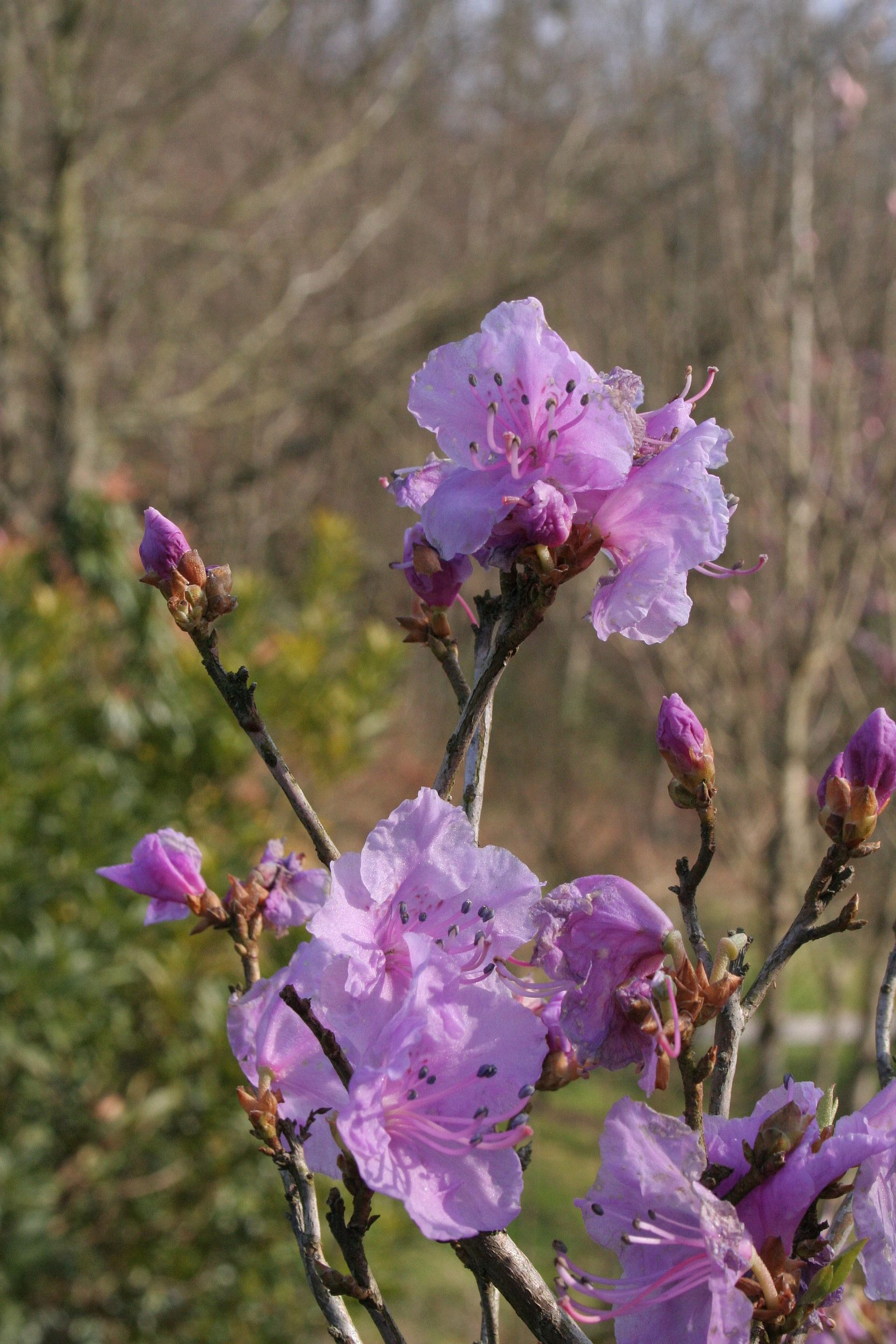 Rhododendron mucronulatum in Conservatoire botanique de Brest